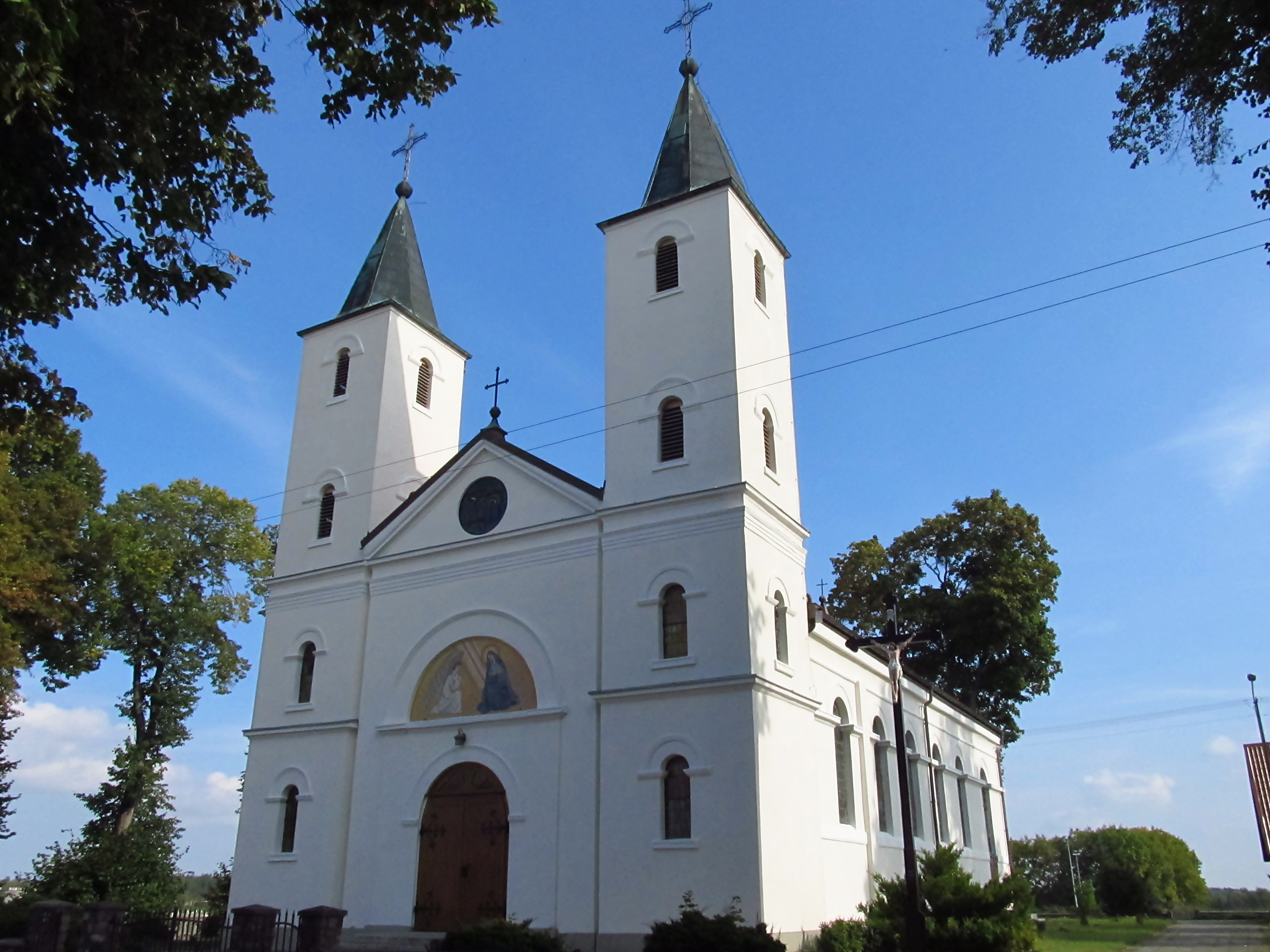 Borzechowo, ul. Lipowa 4 - dawny kościół ewangelicki, obecnie rzymskokatolicki parafialny p.w. św. Anny, 1854